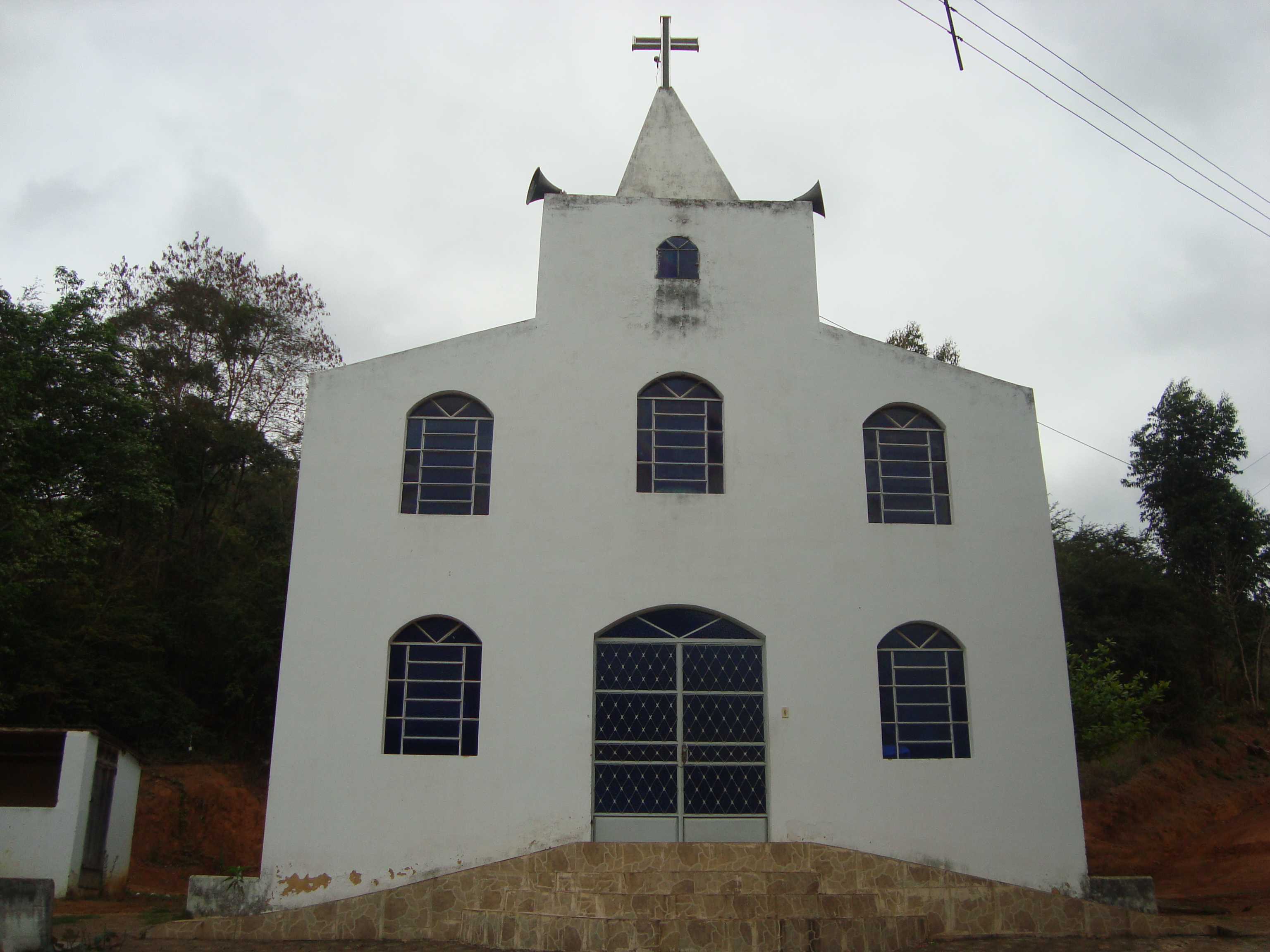 Igreja Católica de São Geraldo